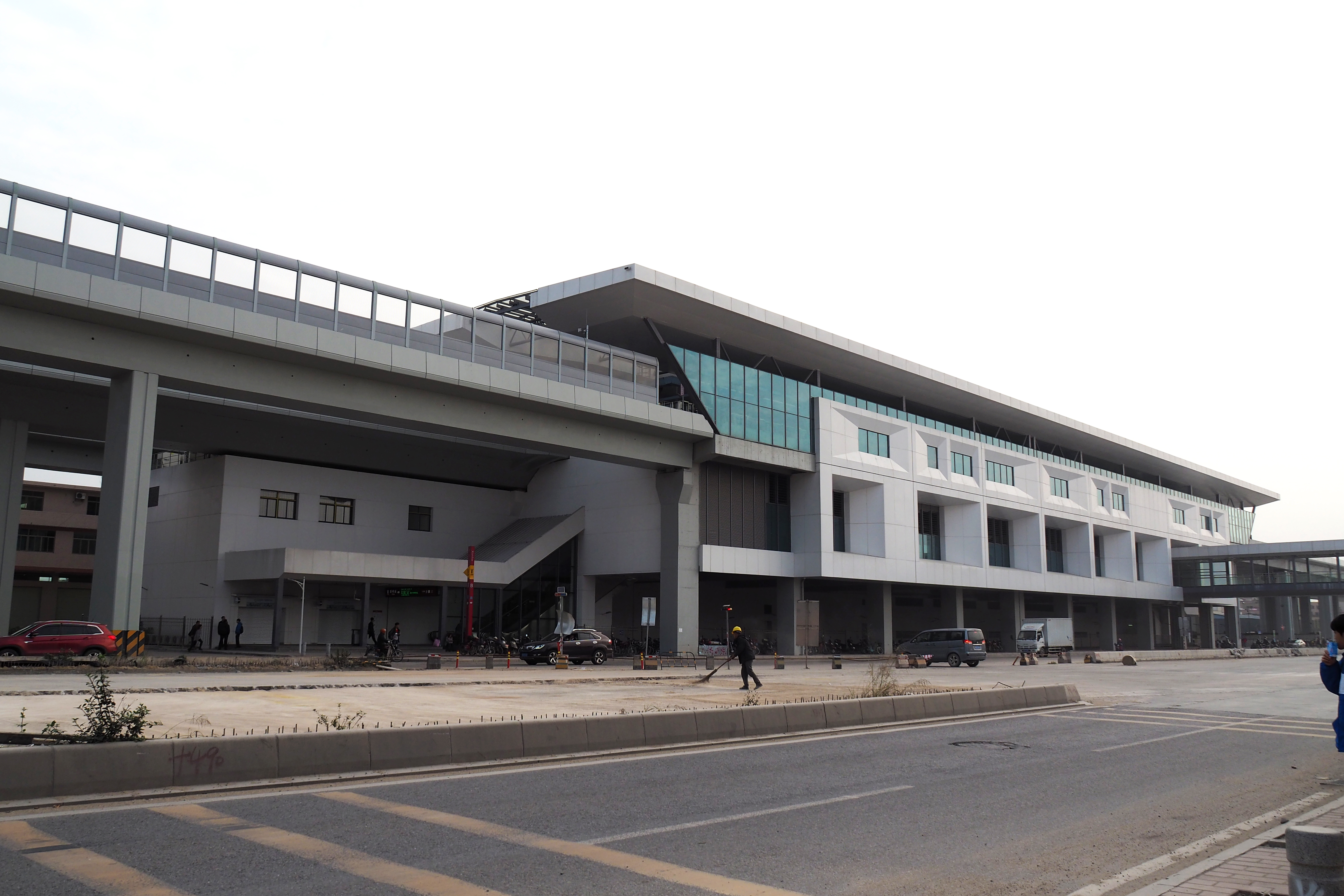 中文（中国大陆）: 广州地铁14号线新和站